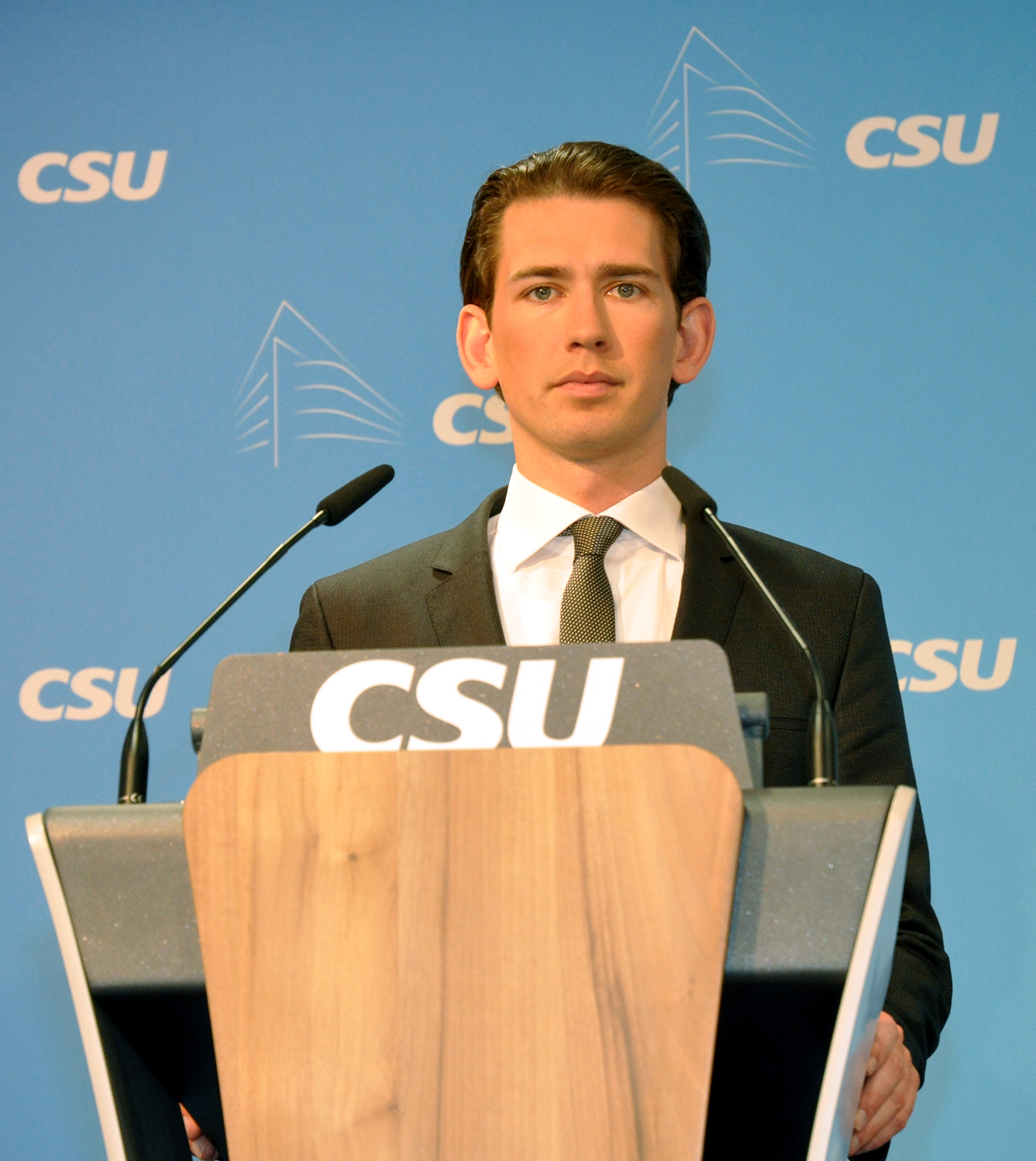 Sebastian Kurz auf einer Pressekonferenz bei der CSU in München 2016